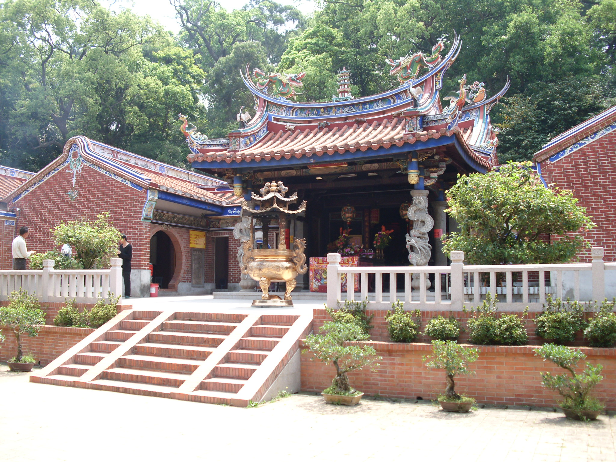 Bân-lâm-gú: 臺灣彰化縣花壇鄉虎山巖。